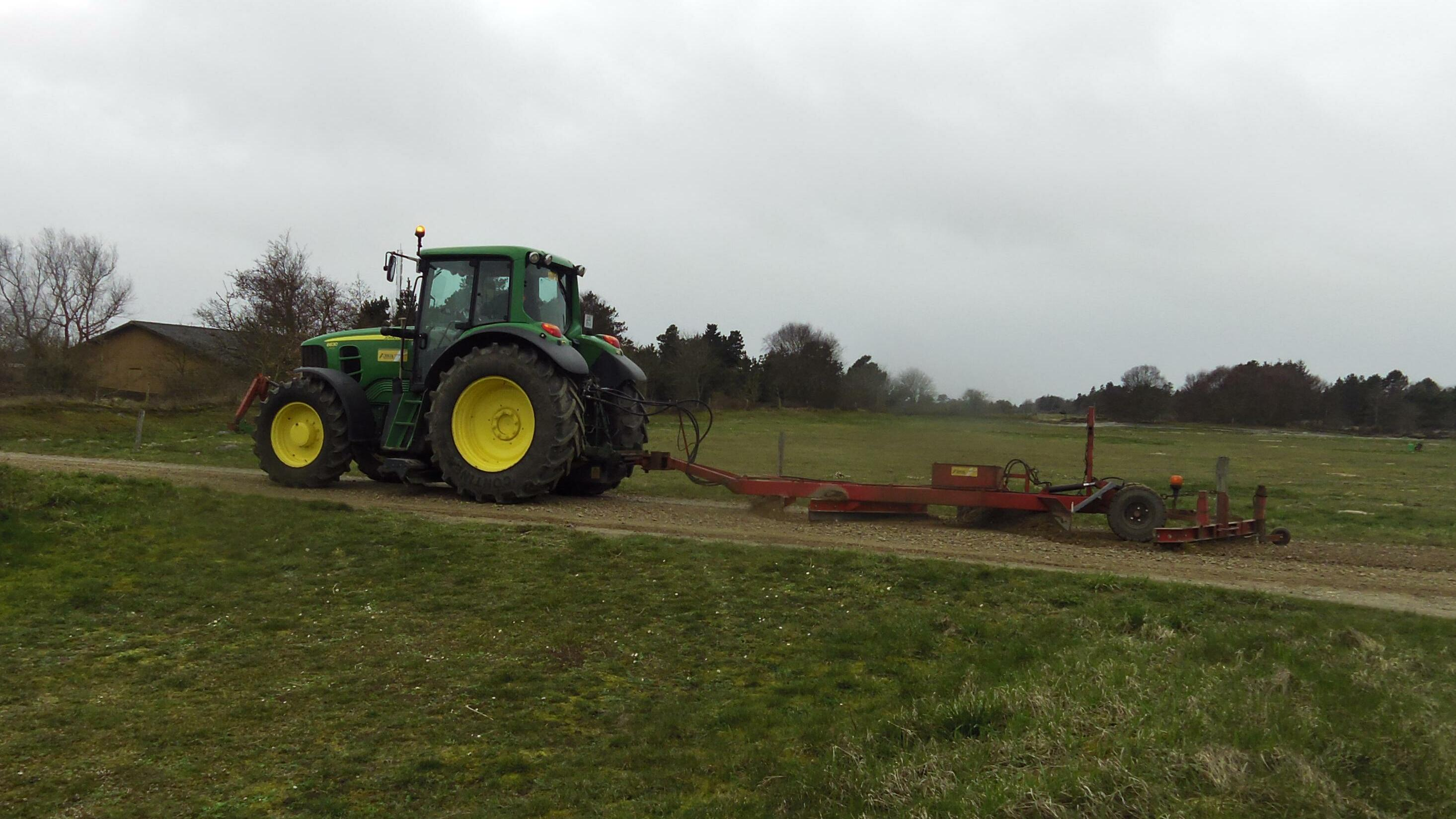 Vedligehold af en grusvej på Rømø